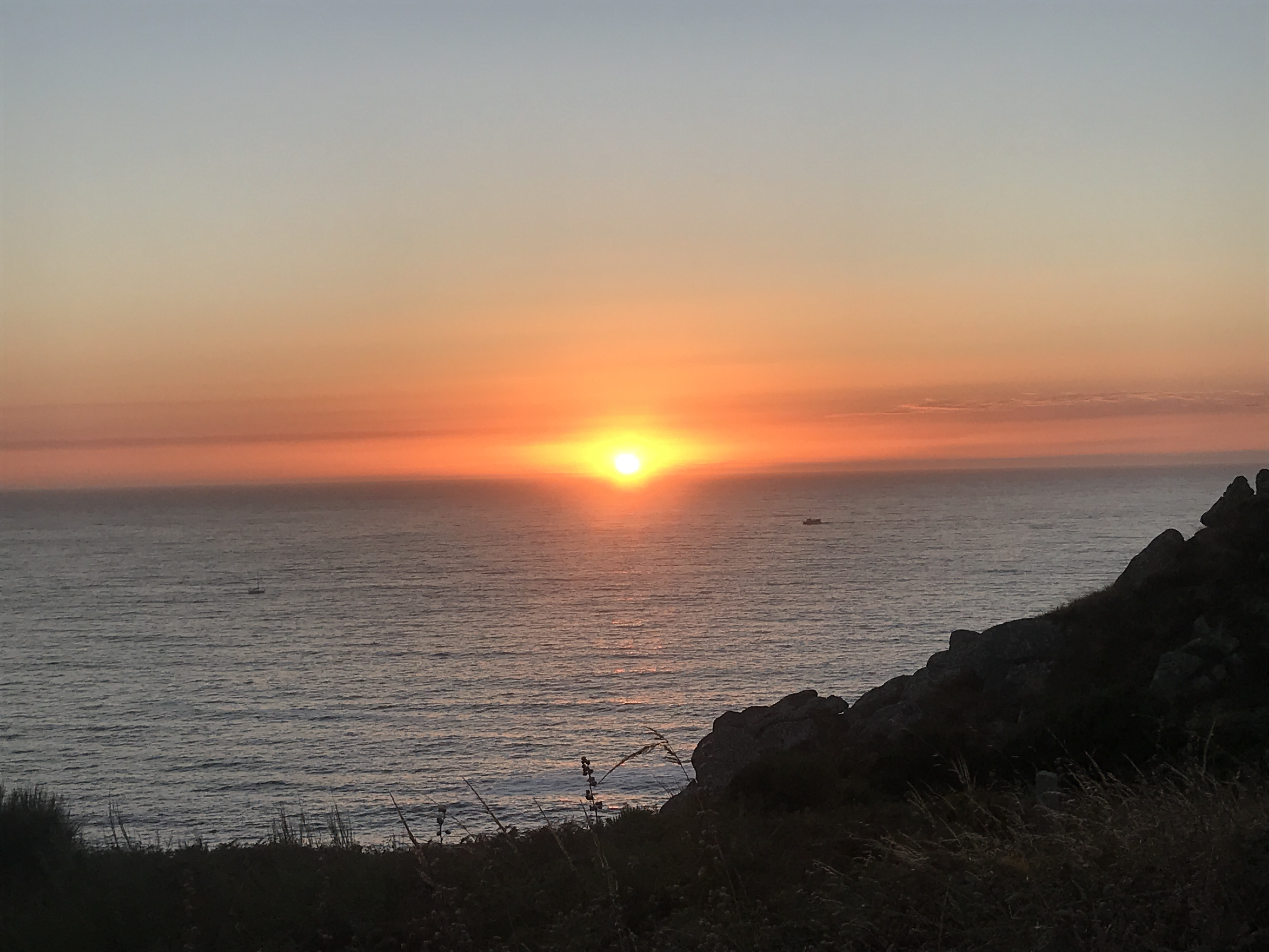 Puesta de sol en Donón, en Cangas, Pontevedra, Galicia (España)